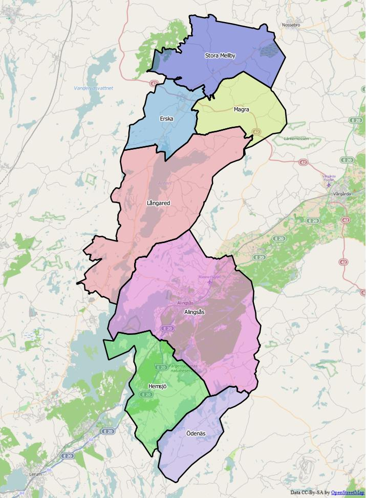 Distriktsindelningen i Alingsås kommun.